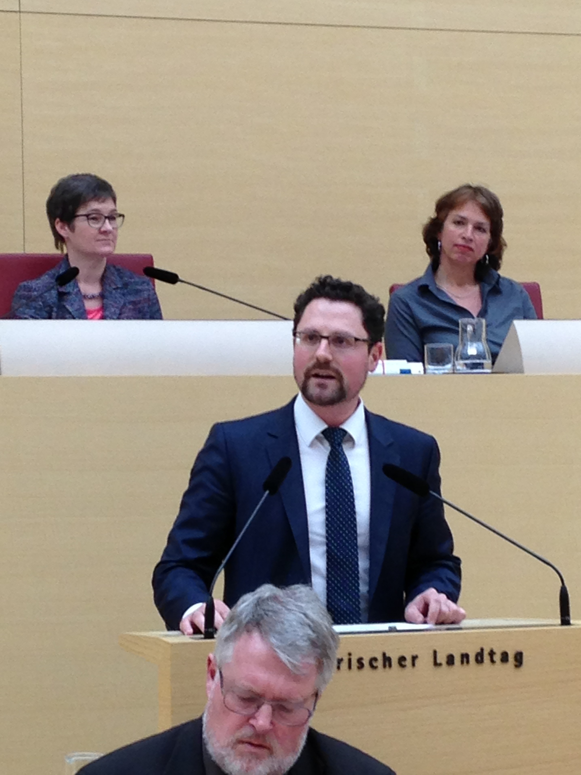 Gerhard Hopp am Rednerpult im Plenum des Bayerischen Landtages.